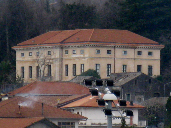 Zafferana Etnea (CT) - Villa Manganelli - Foto D. Pennisi